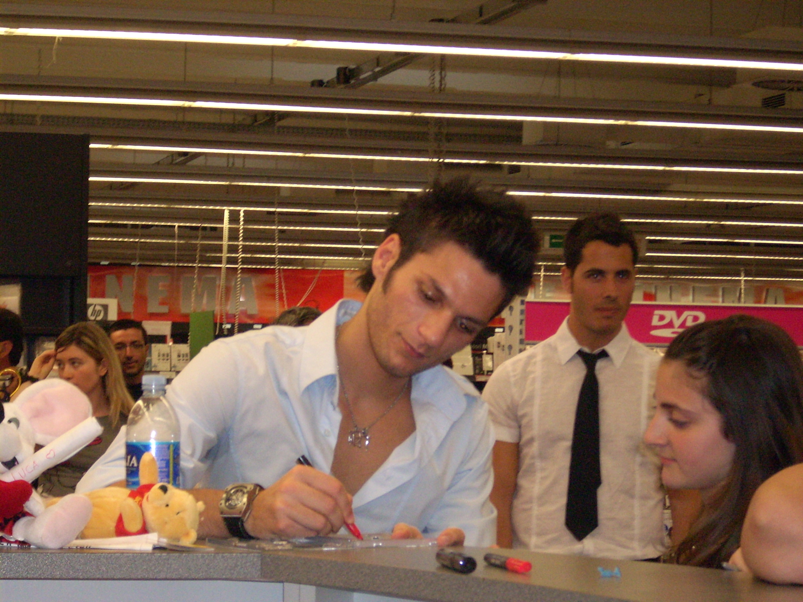 Luca Napolitano per la presentazione del suo cd alla media world di Bari